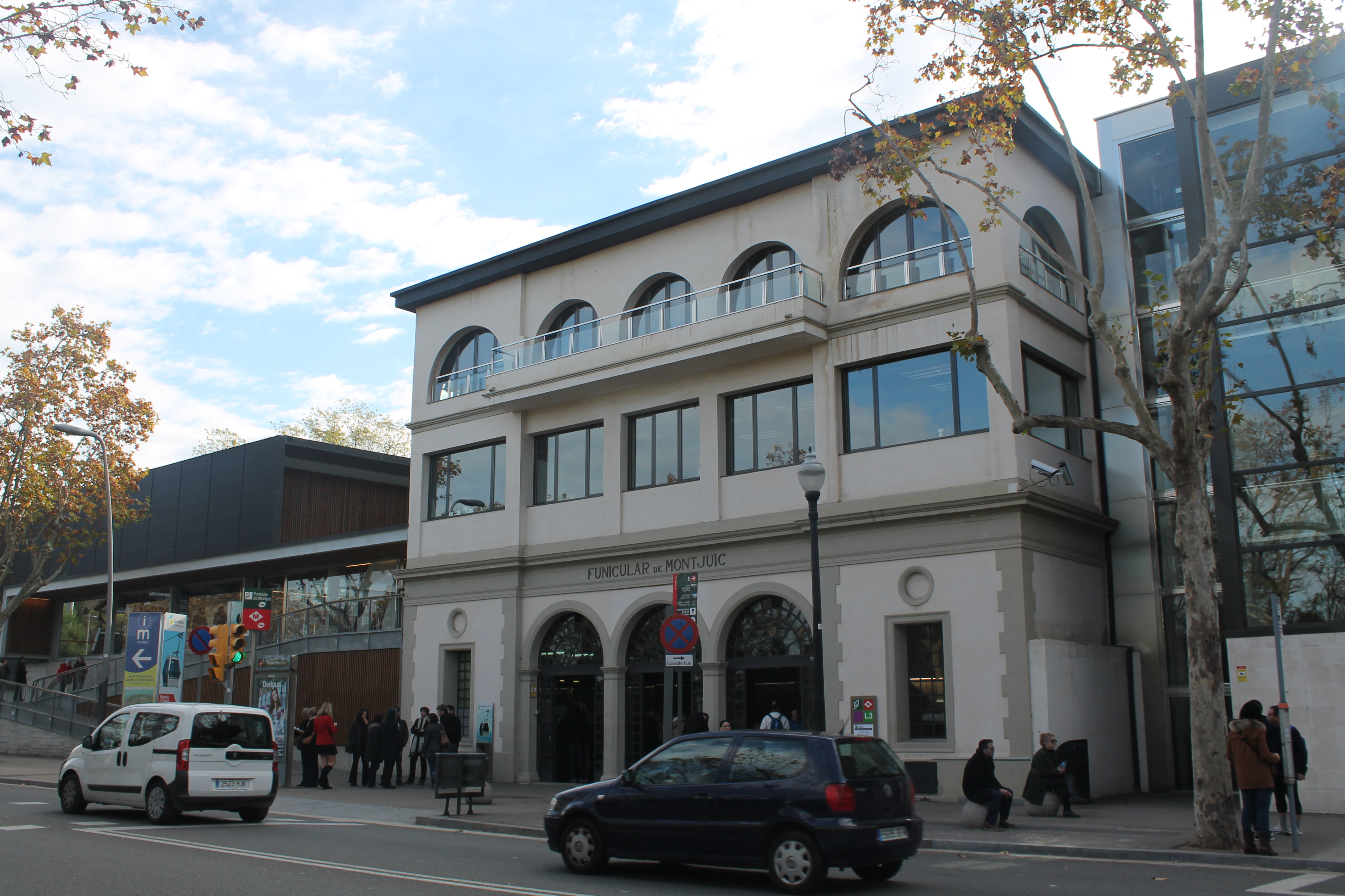 Estación del Teleférico de Montjuich.